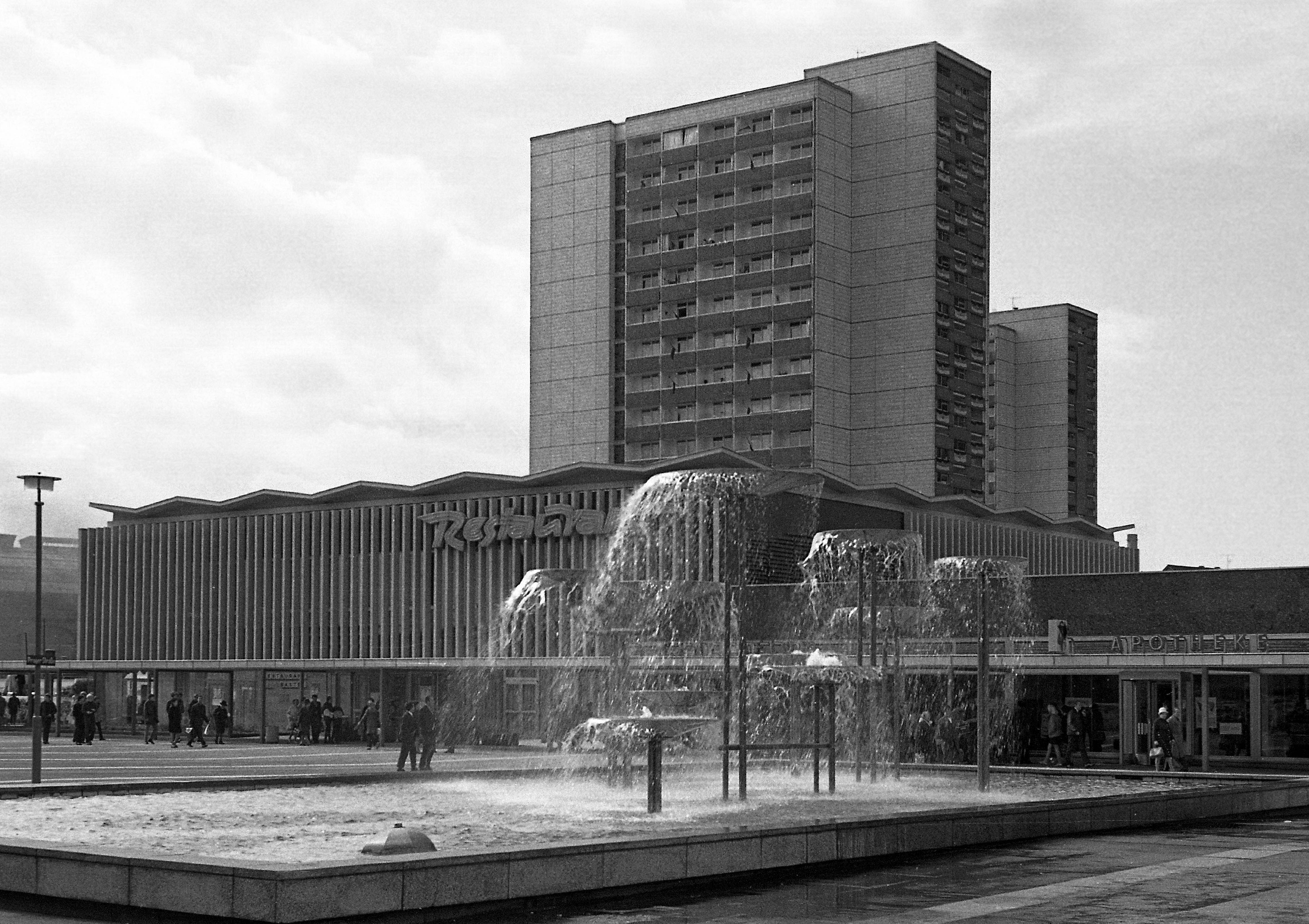 03.10.1970 Dresden, Prager Straße/Wiener Platz: Vorn der Schalen-Brunnen, 1969 von Leoni Wirth (GMP: 51.042979,13.735019). Dahinter das SB-Restaurant "Bastei" mit (hier nicht sichtbarem) Keramik-Wandbild "Dresden grüßt seine Gäste" (GMP: 51.042597,13.734035). Dahinter die Hochhäuser Reitbahnstraße 35/36 (GMP: 51.042561,13.733189). Links zum Bahnhof. [F19701001A038.JPG]19701003500NR.JPG(c)Blobelt